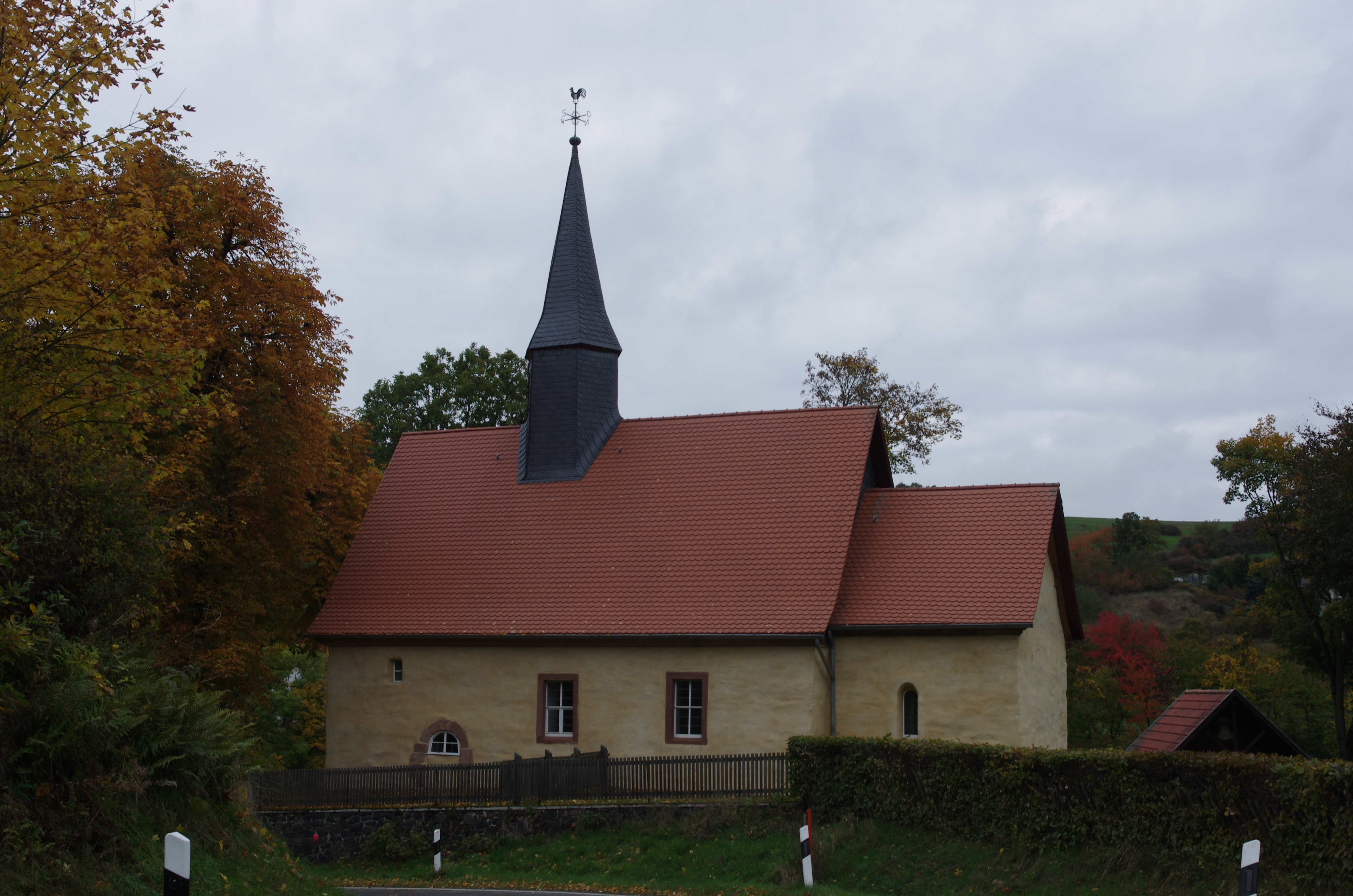 Bad Wildungen Ortsteil Hüddingen in Hessen. Die Kirche steht am Ortsrand.